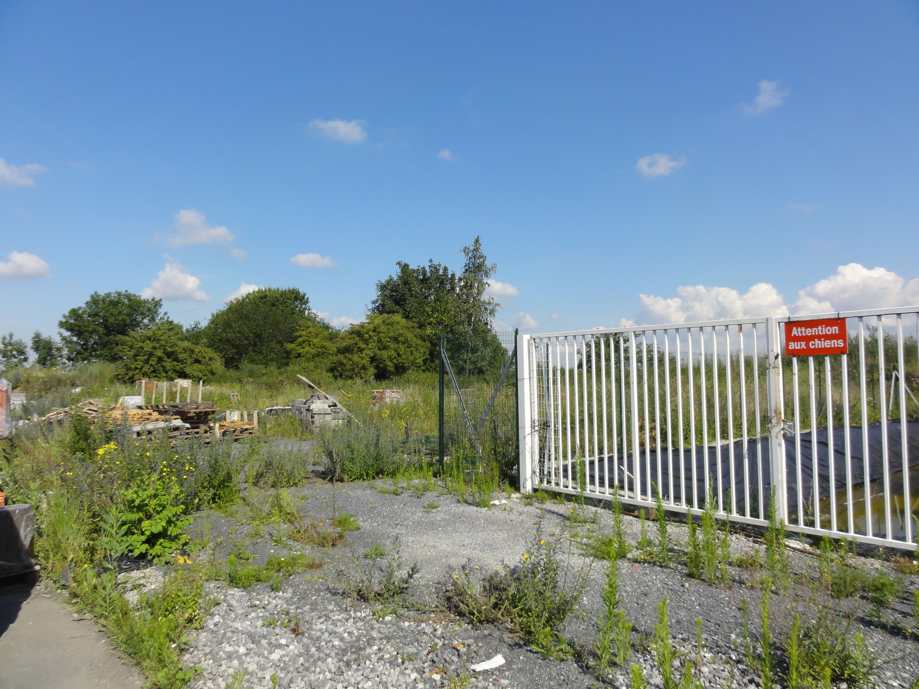 Terril n° 127A dit Traisnel Ouest, disparu, Fosse Traisnel de la Compagnie des mines d'Aniche, Aniche, Nord, Nord-Pas-de-Calais, France.